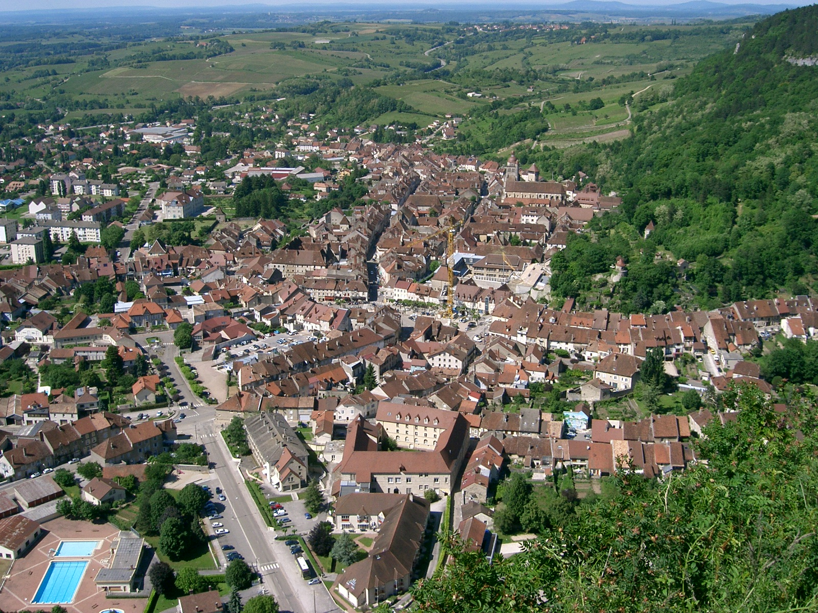 Poligny commune du Jura en France, vu depuis la Croix du Dan. self made PRA